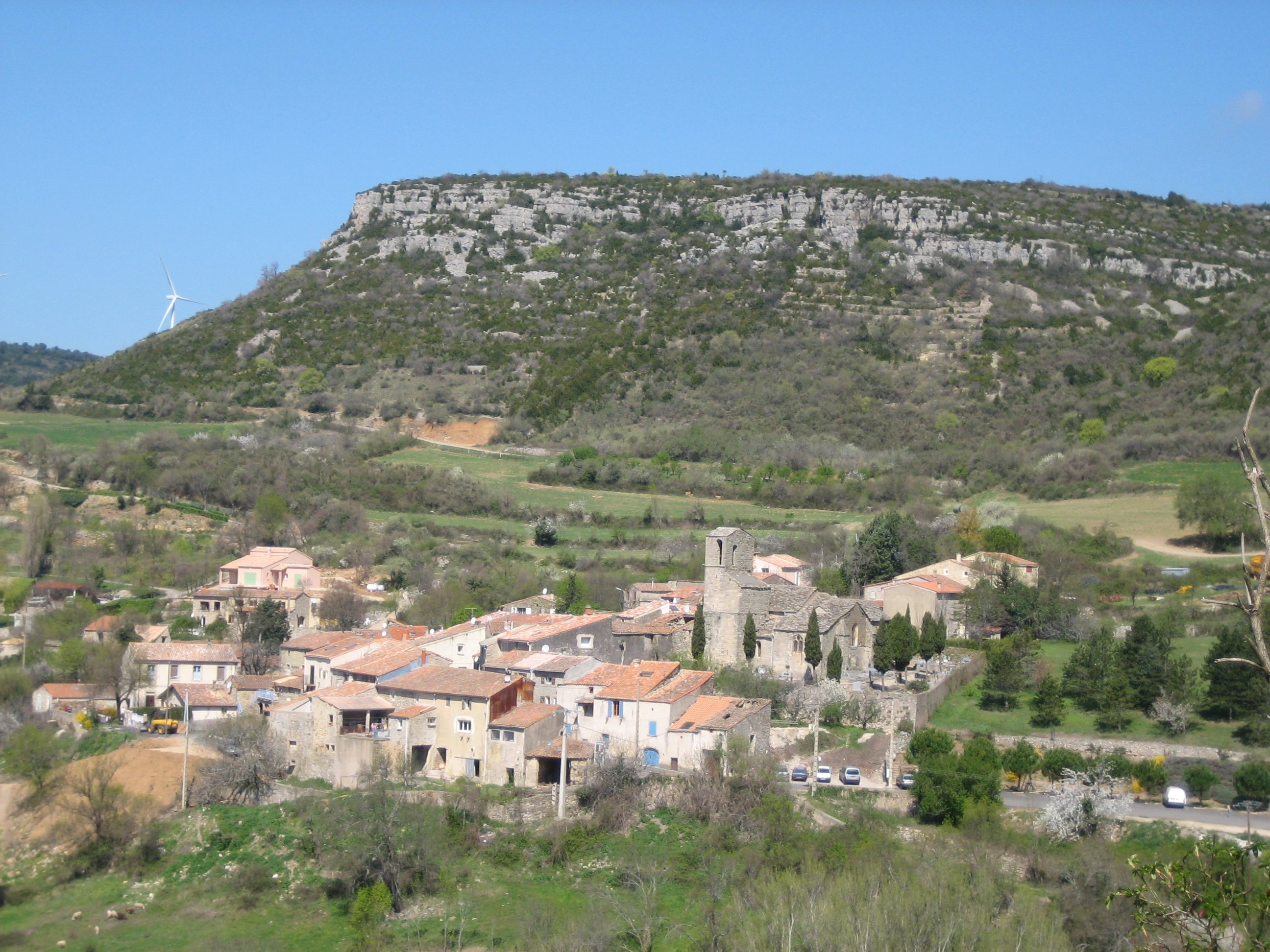 Valquières (Dio-et-Valquières - Hérault) - vue générale.